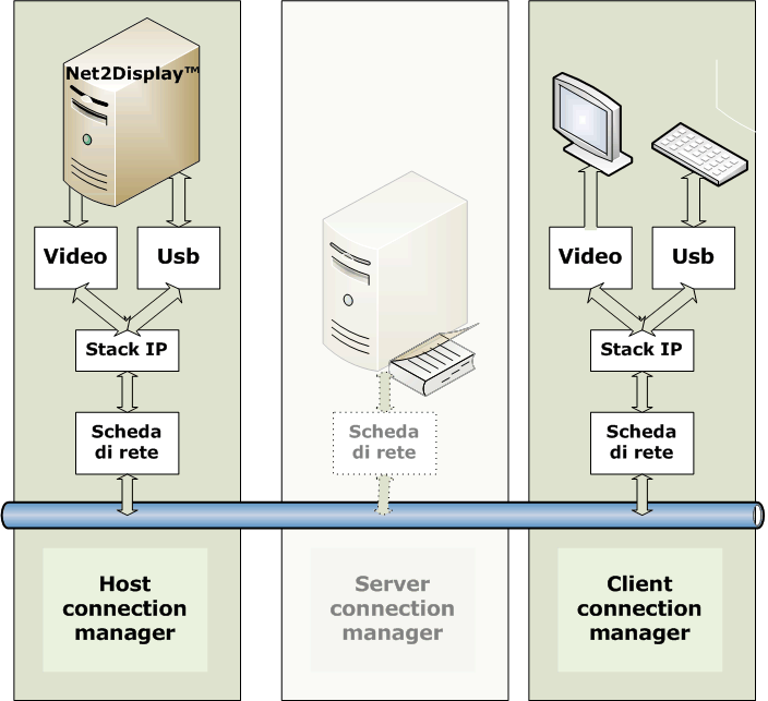 Diagramma del sistema Net2display